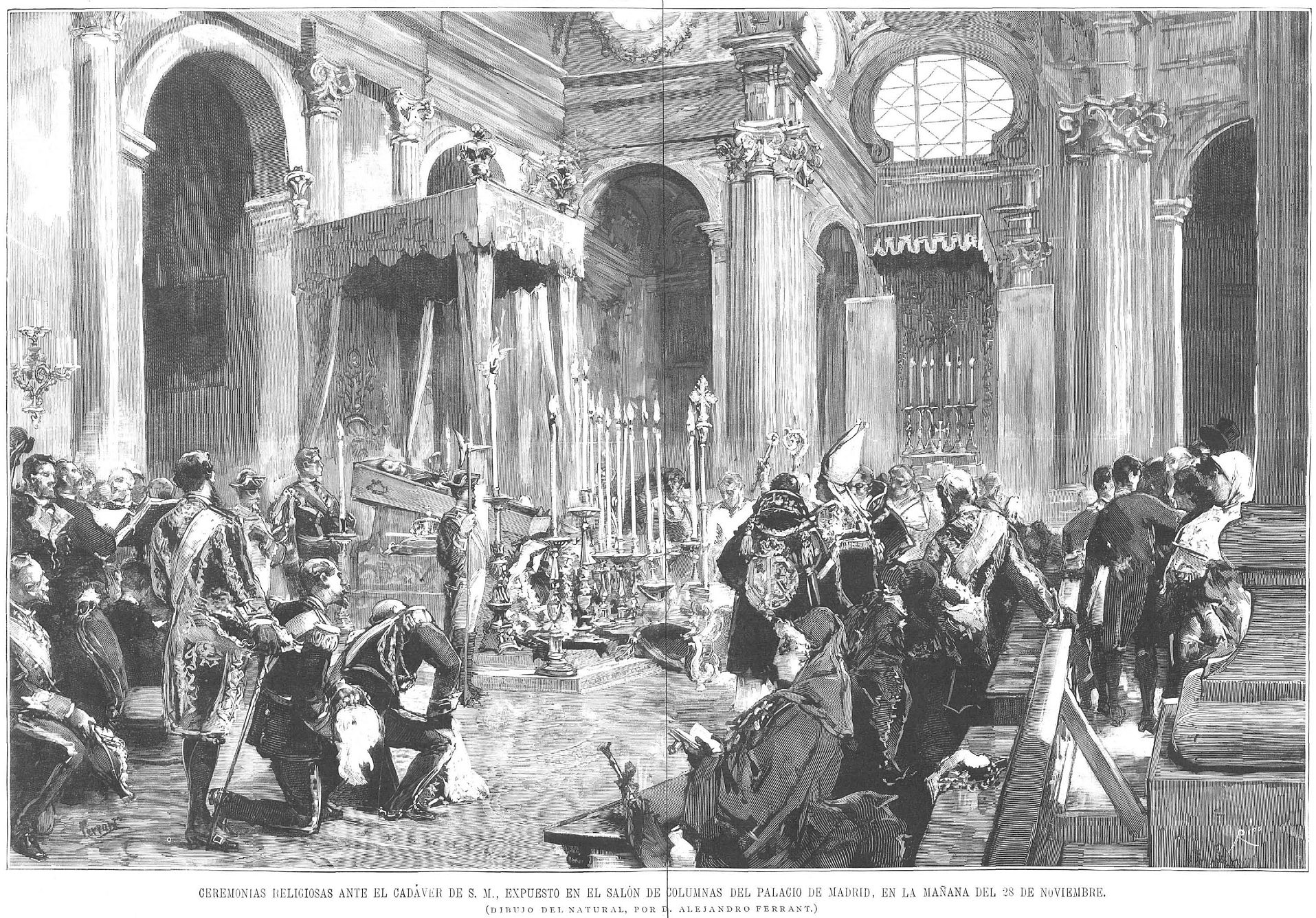 Ceremonias religiosas ante el cadáver de Alfonso XII, en el Salón de Columnas del Palacio de Madrid, en la mañana del 28 de noviembre de 1885, grabado publicado en la revista española La Ilustración Española y Americana.